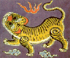 臺灣民主國國旗